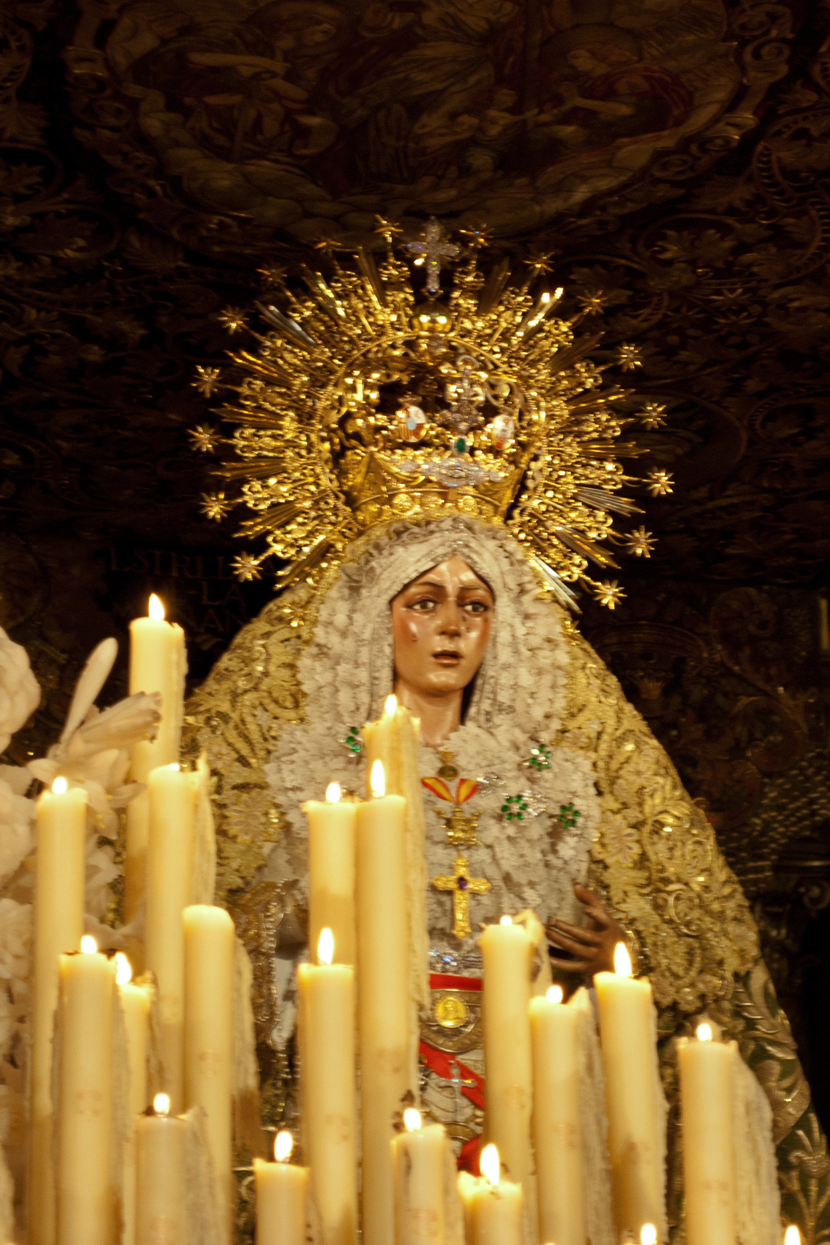 Virgen de la Esperanza Macarena, Basílica de la Macarena. Semana Santa de Sevilla.